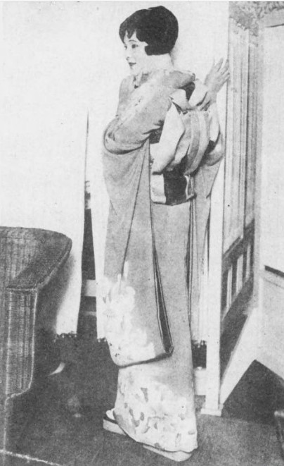 岡村文子 1928